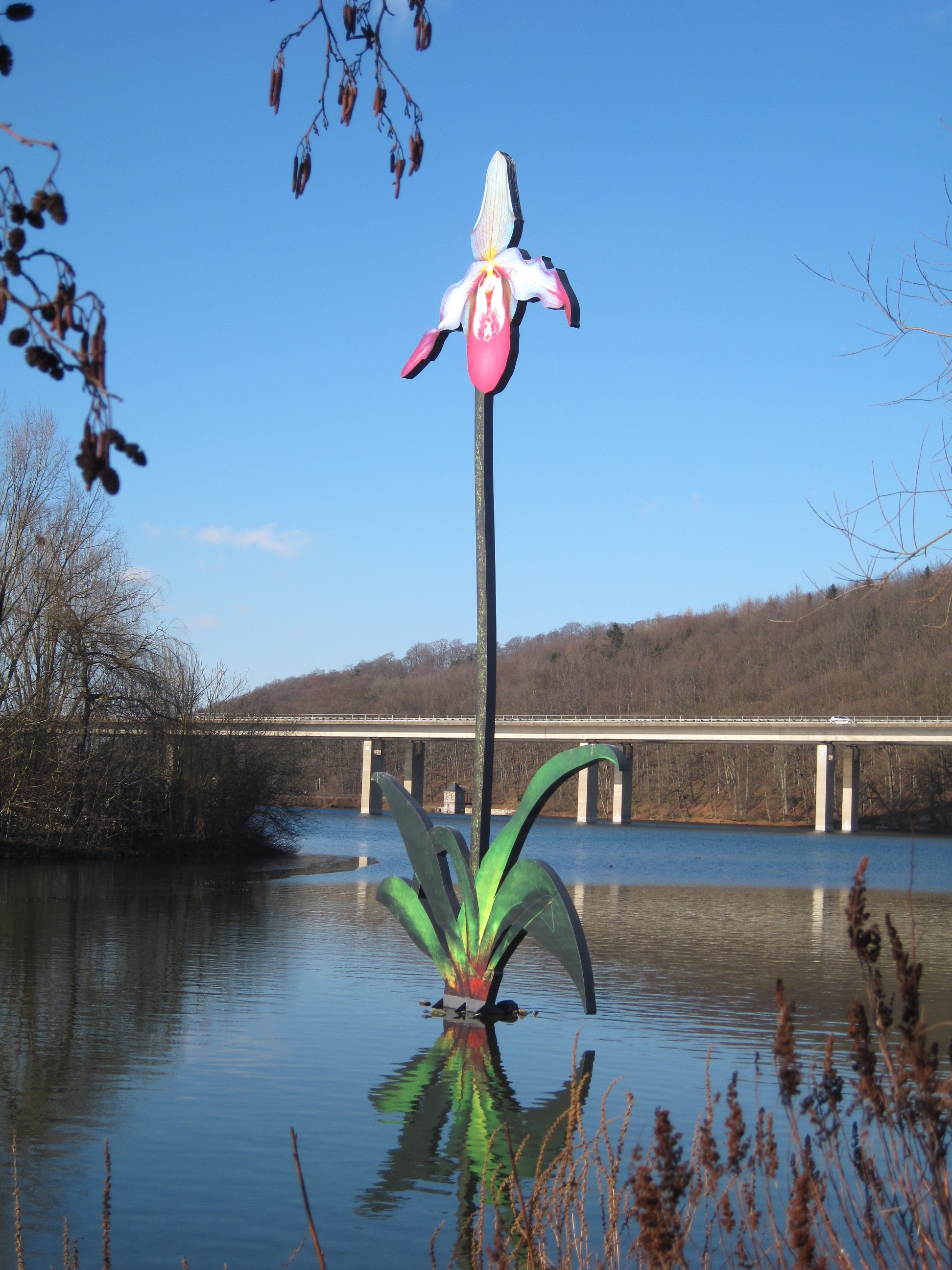 Orchidee mit pink- und weißfarbenen Blütenblättern aus Stahl des britischen Künstlers Marc Quinn aus dem Jahre 2003 in Iserlohn im Seilersee.